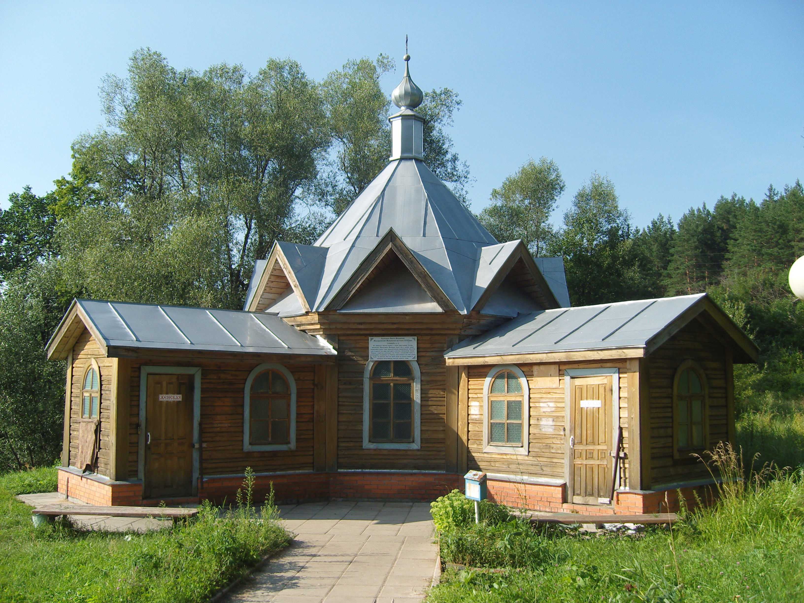 Жабынь